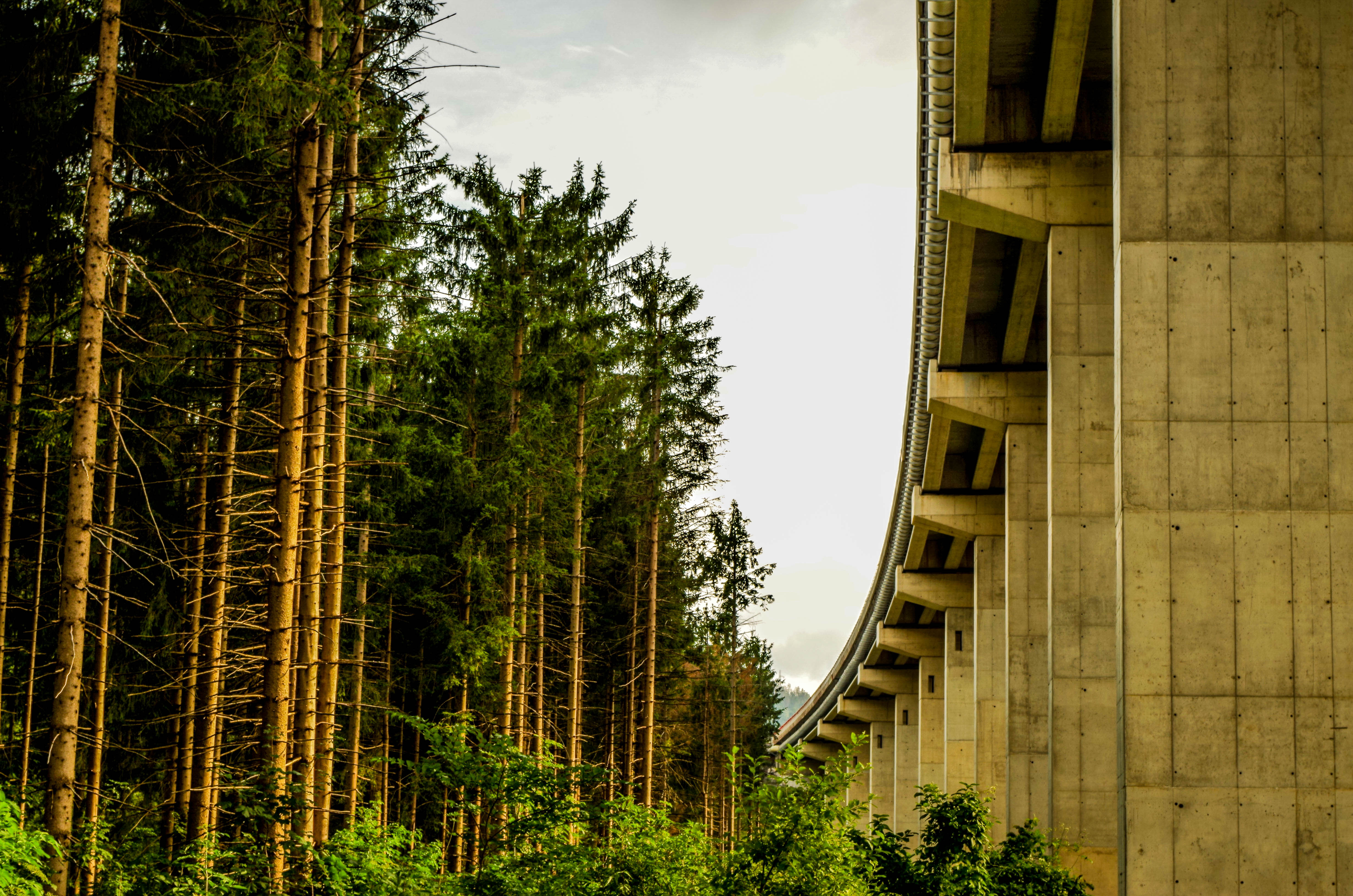 Park prirode Golubinjak, odnos prirode i čovjeka